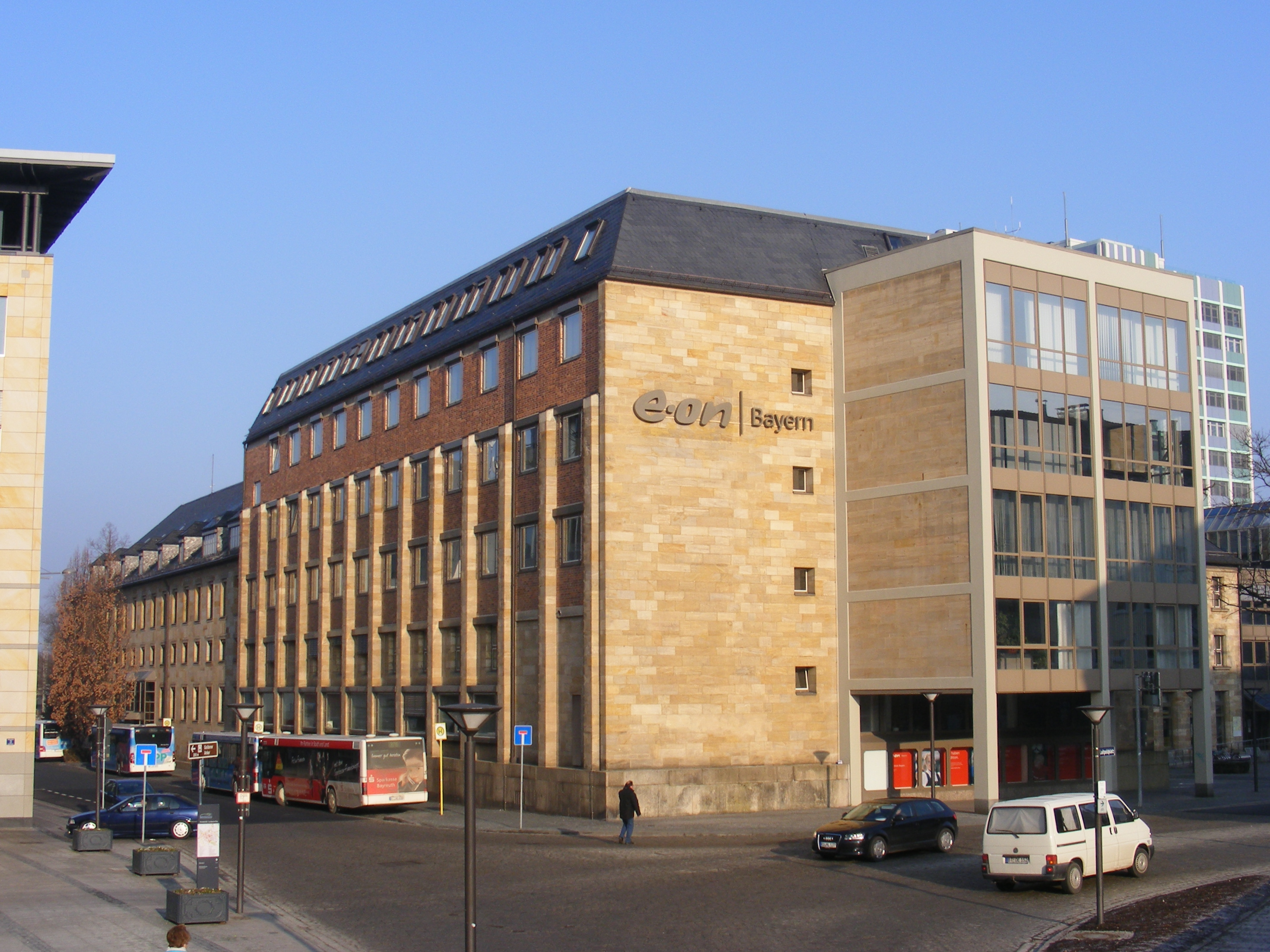 Bayreuth - E.ON Bayern Aktiengesellschaft, Luitpoldplatz 5 (Außenansicht)